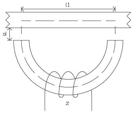 Schemat czujnika dławikowego z zaznaczonymi parametrami.